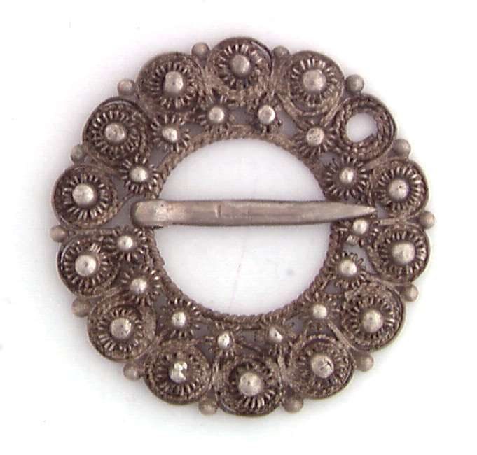 Erlandssølje, filigransarbeid i sølv, innkjøpt i 1878 i Øystre Slidre, Oppland. Foto Anne-Lise Reinsfelt / Norsk Folkemuseum, NF.1994-0097.